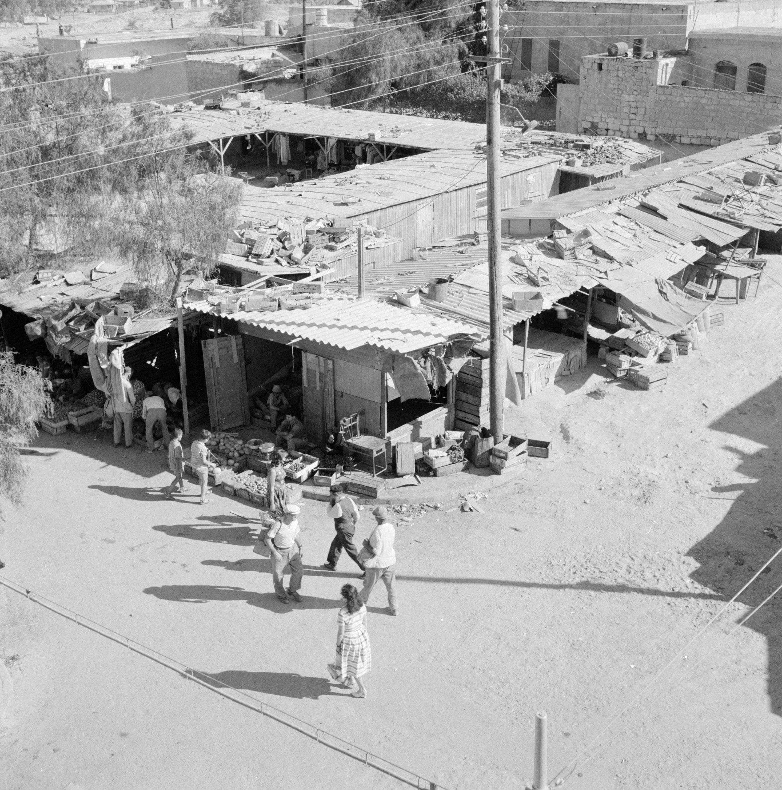 Collectie / Archief : Fotocollectie Van de Poll Reportage / Serie : Israël: Bersjeba Beschrijving : Markt met vele kramen en een elektriciteitsmast vanuit vogelvluchtperspectief Datum : ongedateerd Locatie : Bersjeba, Israël Trefwoorden : energievoorziening, handel, markten, straatbeelden Fotograaf : Poll, Willem van de, [onbekend] Auteursrechthebbende : Nationaal Archief Materiaalsoort : Negatief (zwart/wit) Nummer archiefinventaris : bekijk toegang 2.24.14.02 Bestanddeelnummer : 255-3527